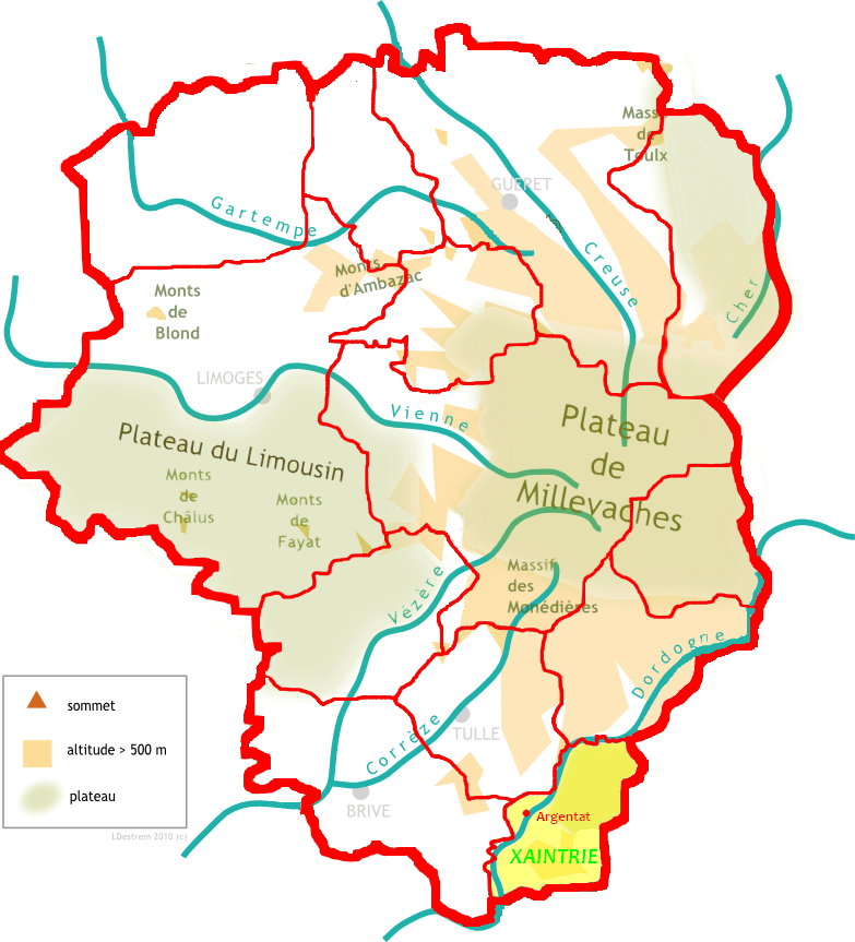 Localisation de la Xaintrie sur la carte des pays traditionnels du Limousin